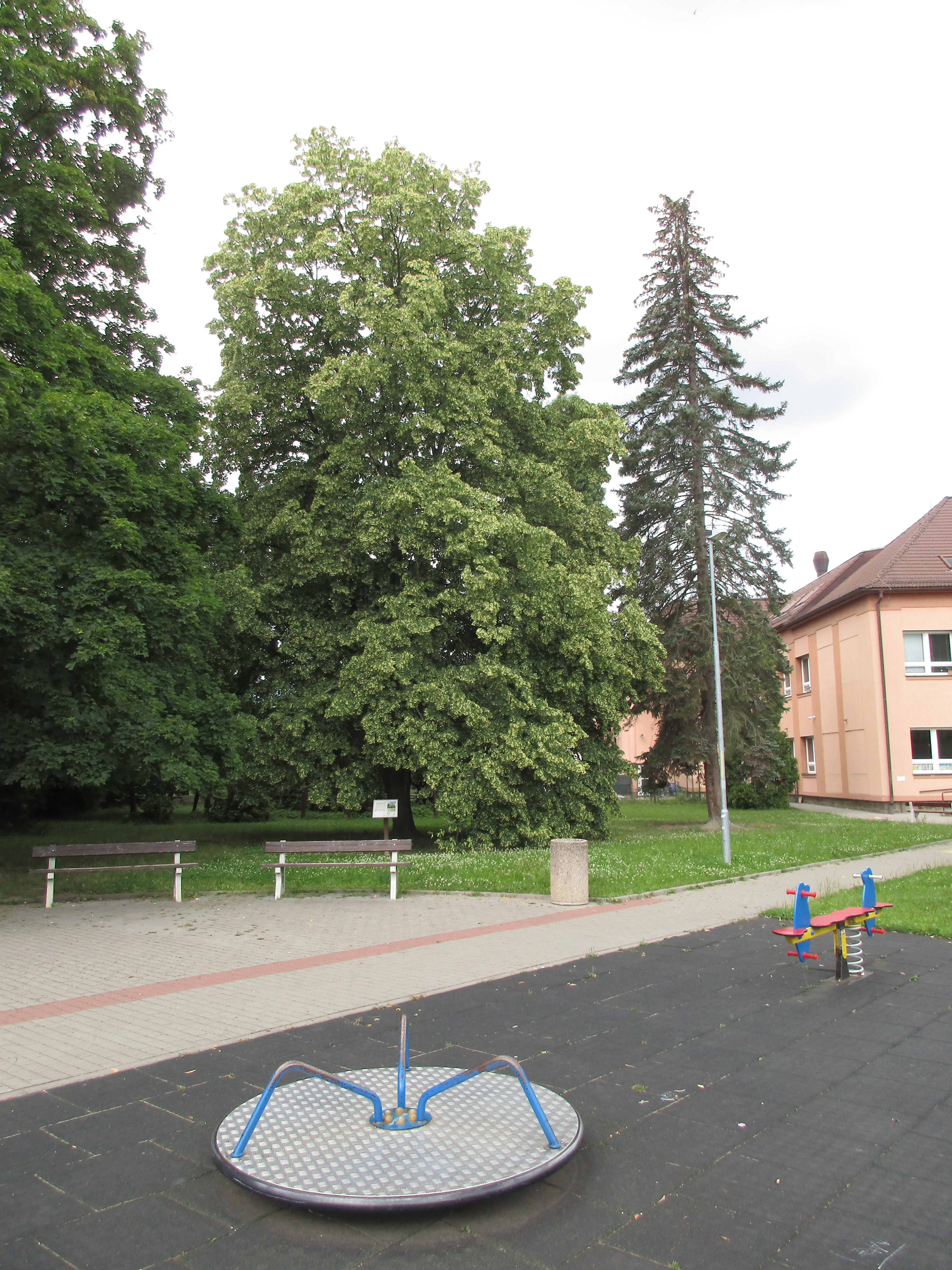 Lípa republiky. Praha 9 - Újezd nad Lesy, Staroklánovická.